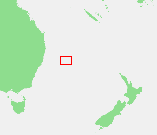 Lord Howe Island